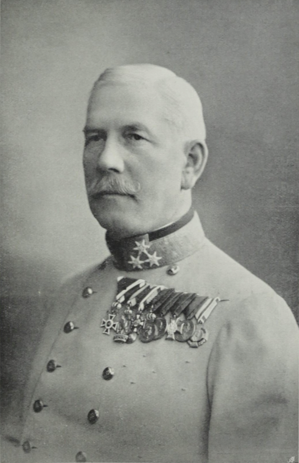 Friedrich Alfred Ritter von Ziegler (1854–1921), Austrian-Hungarian general